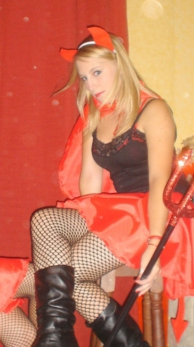 blonde fishnet